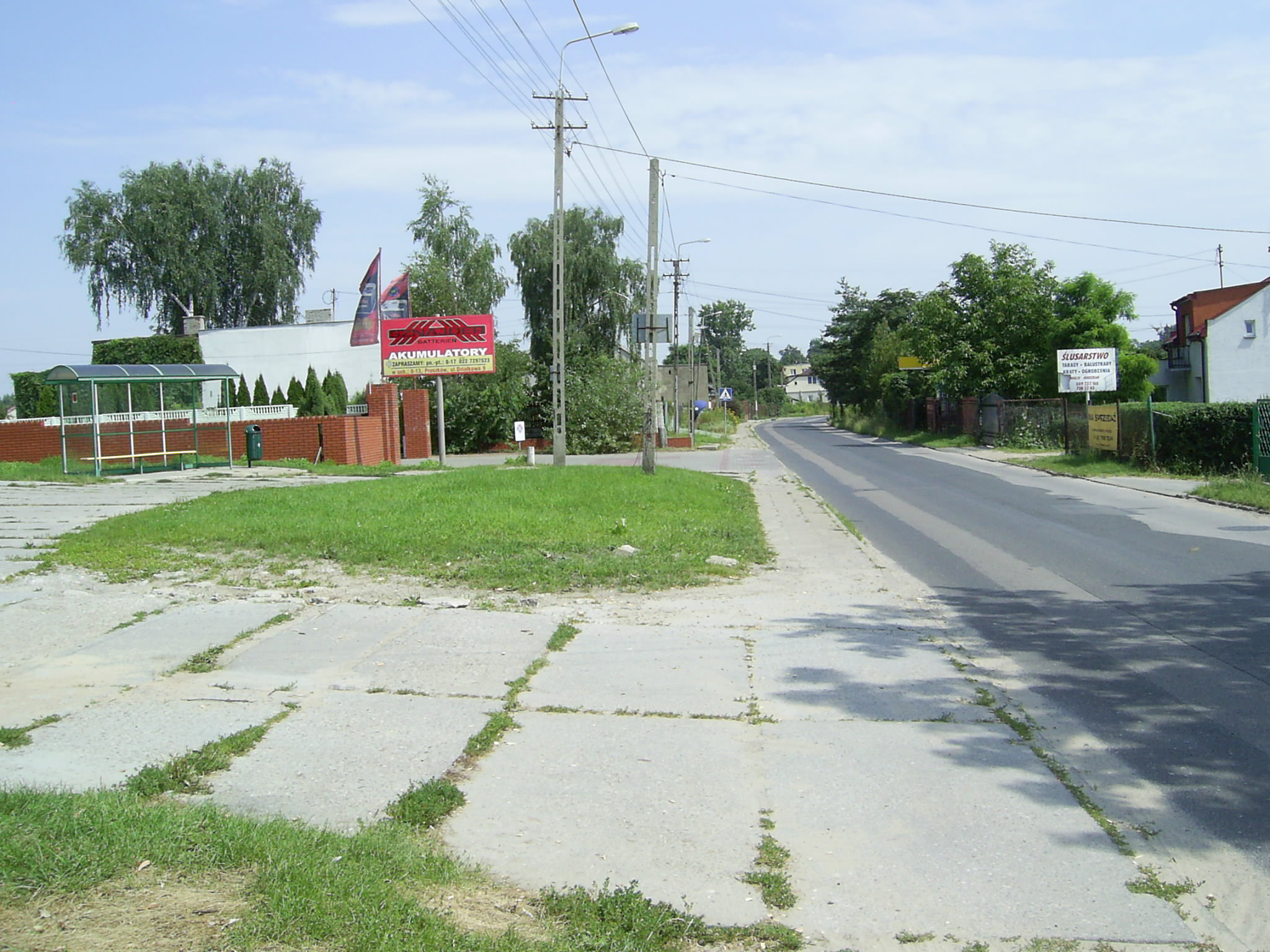 Pętla autobusowa w Parzniewie.